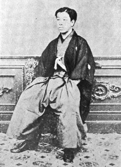 宗重正（宗義達）